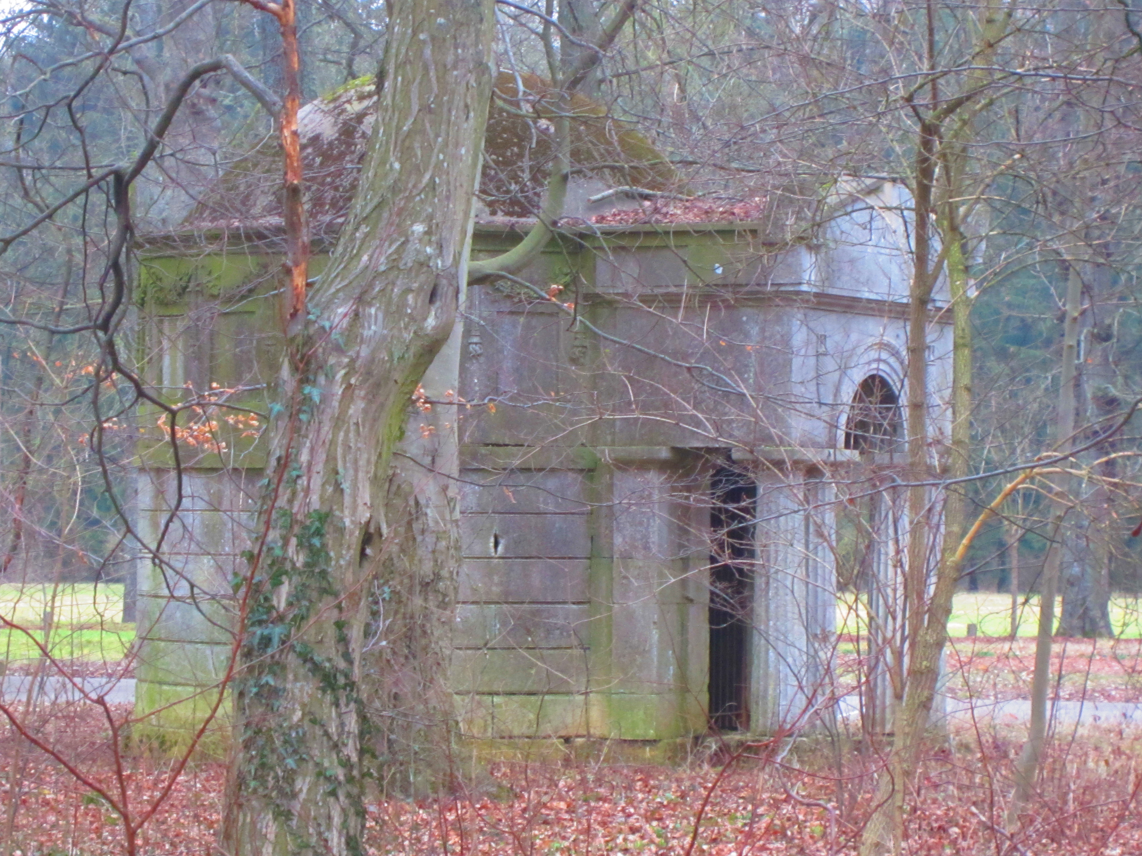 Petite chapelle seminaire Cuvry